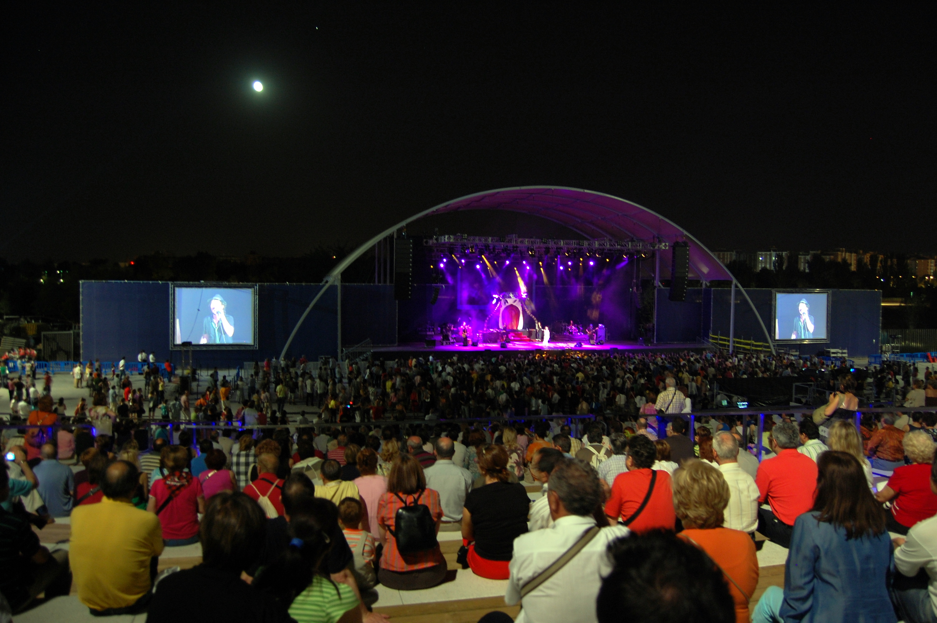 Carmen París en el Anfiteatro de la Expo 2008.